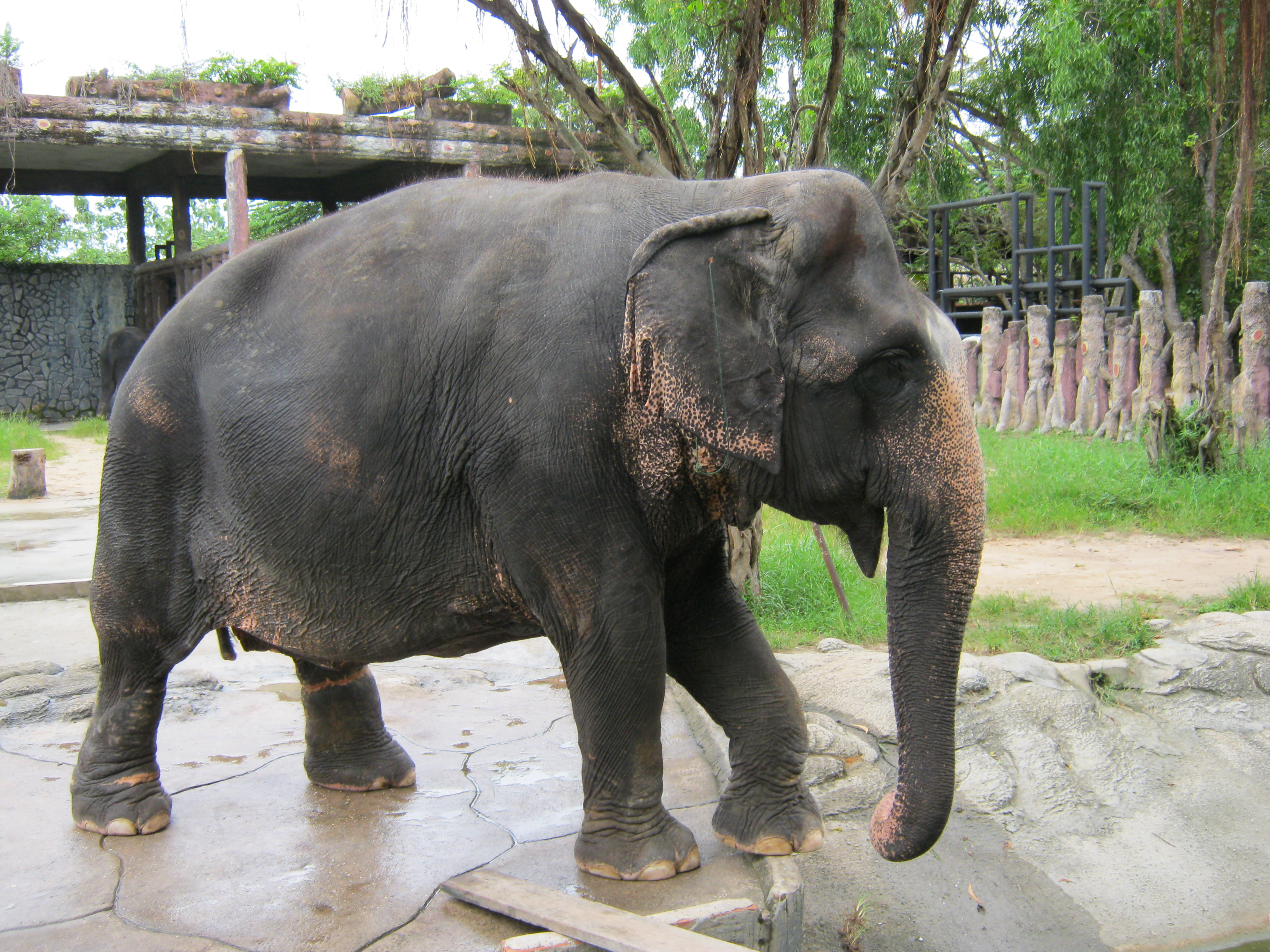 Voi được nuôi tại khu du lịch Đại Nam (Bình Dương, Việt Nam).